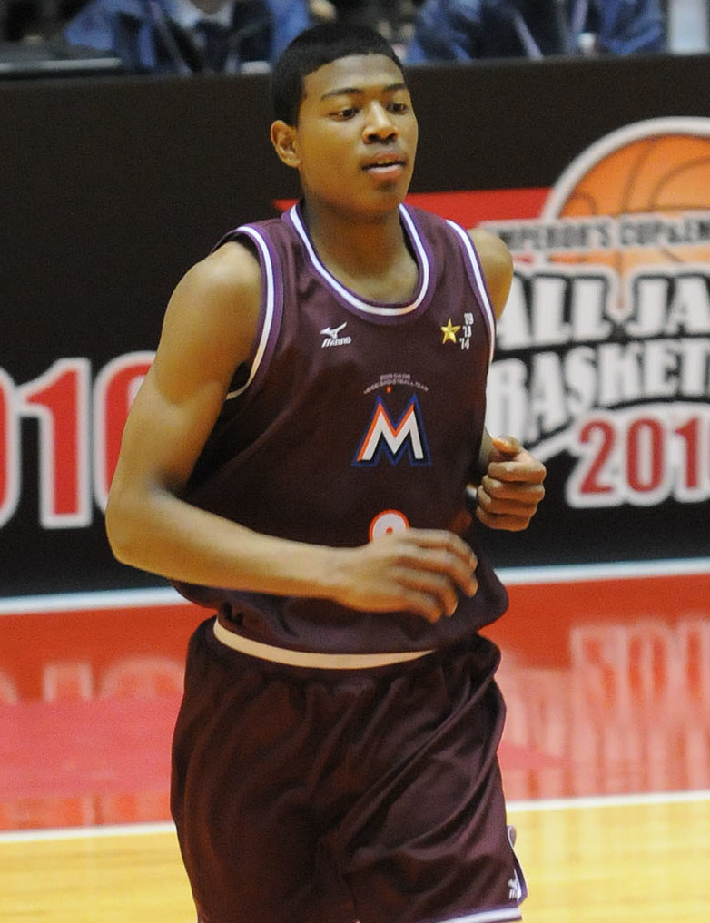 明成高等学校、八村塁選手。代々木第一体育館で。